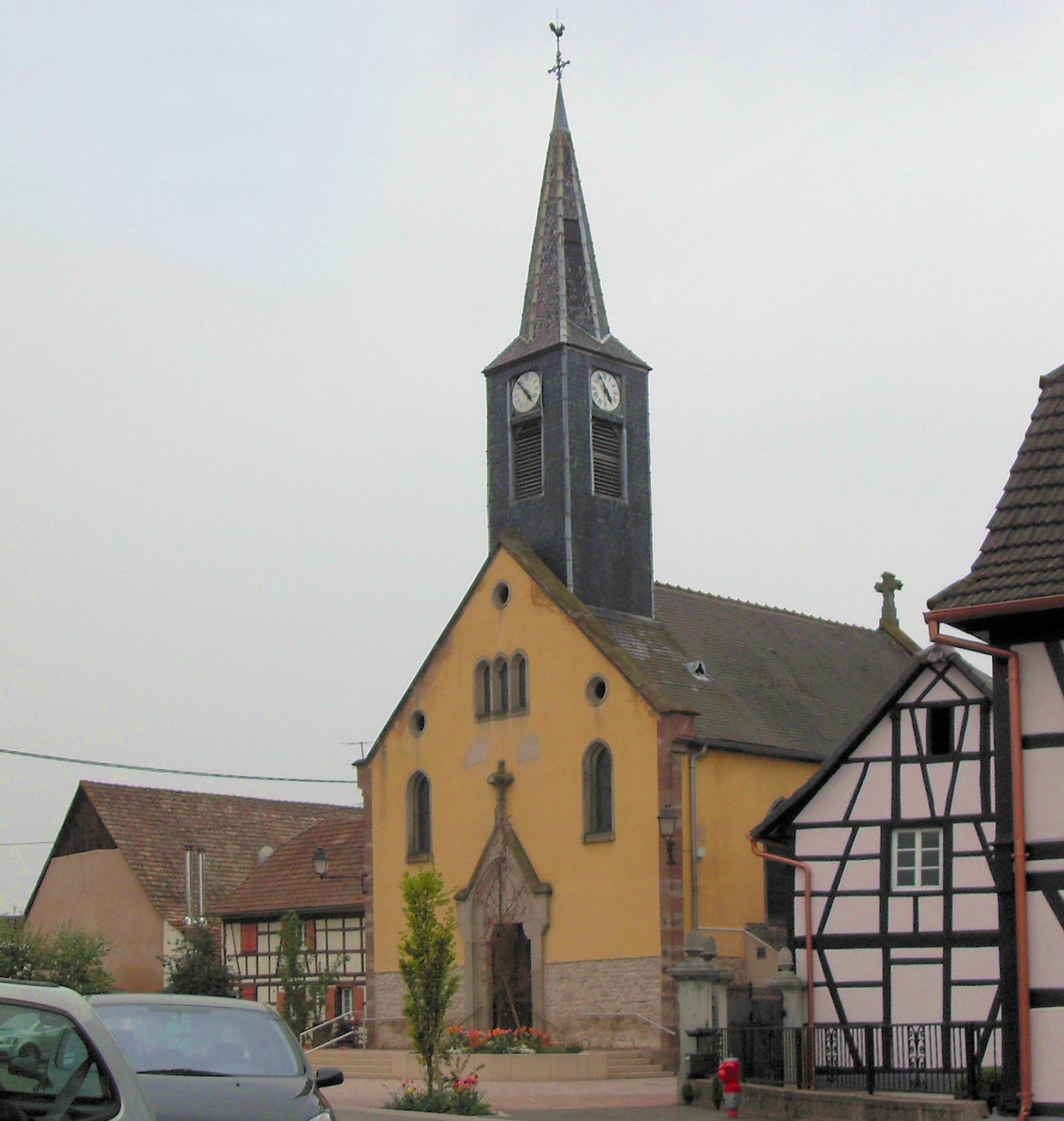 La chapelle Saint-Wendelin à Hipsheim, côté nord